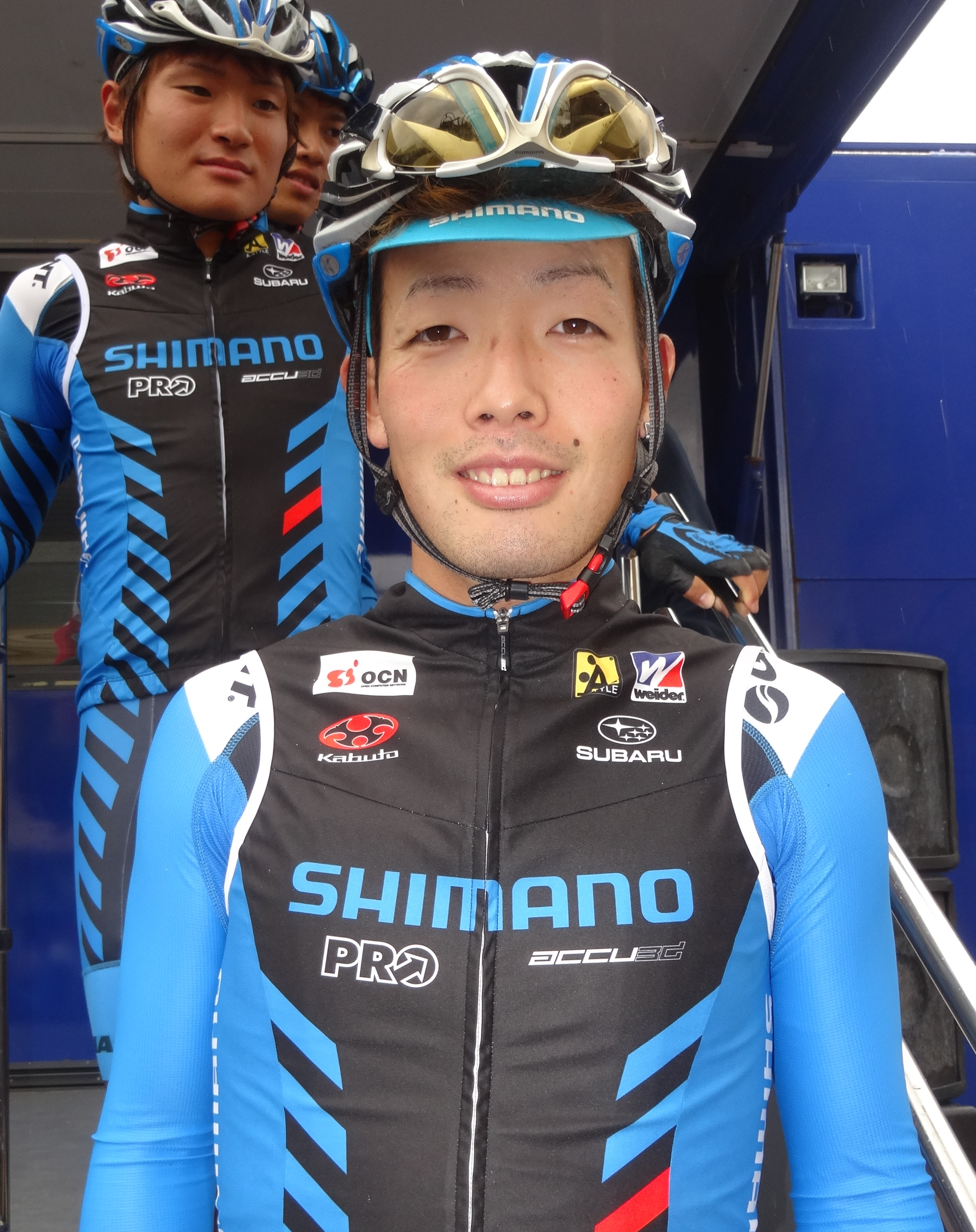 Reportage photographique réalisé le dimanche 13 juillet à l'occasion du départ et de l'arrivée de la Ronde pévéloise 2014 à Pont-à-Marcq, Nord-Pas-de-Calais, France.